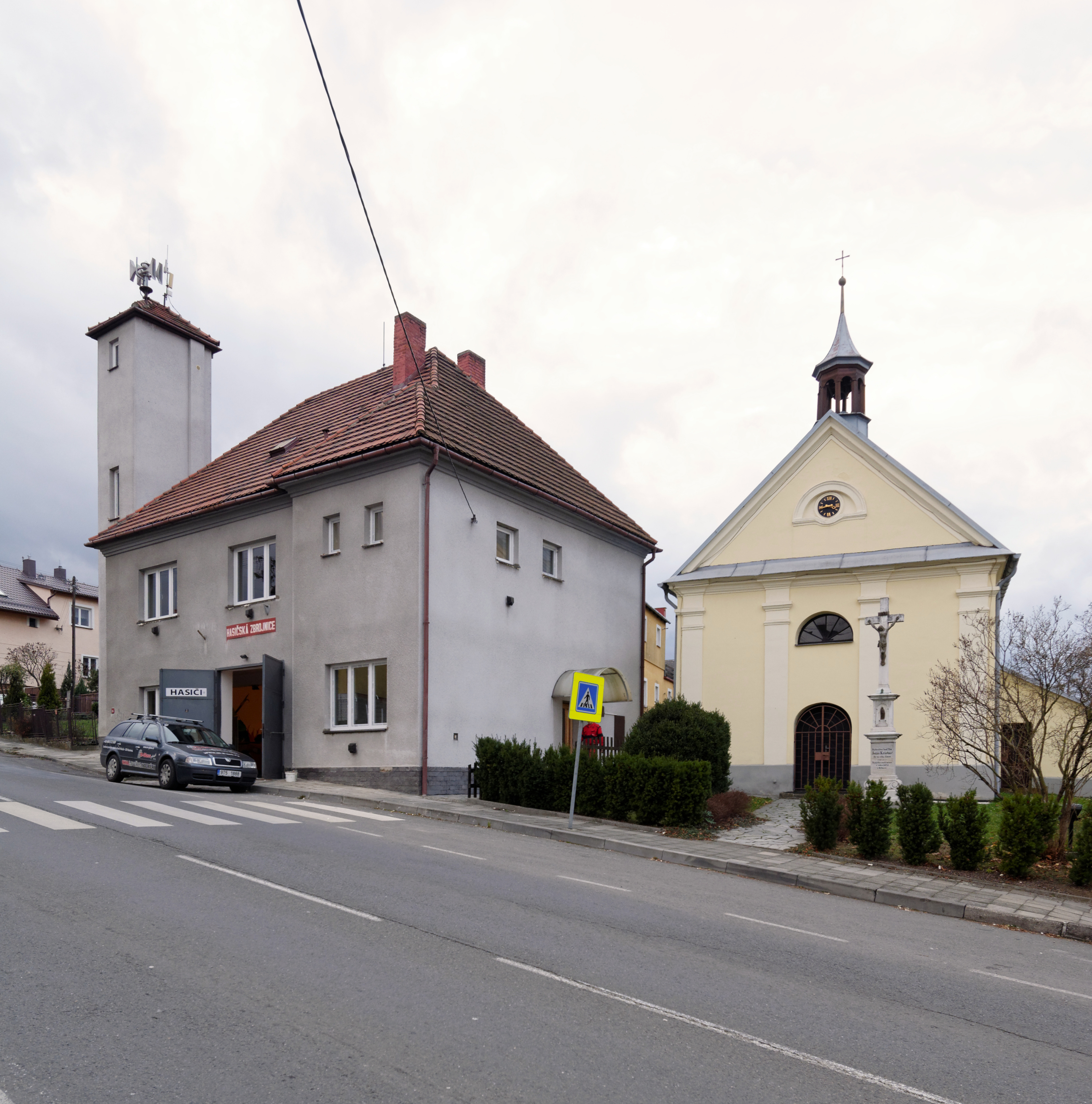 Kaple Navštívení Panny Marie, Děhylov.